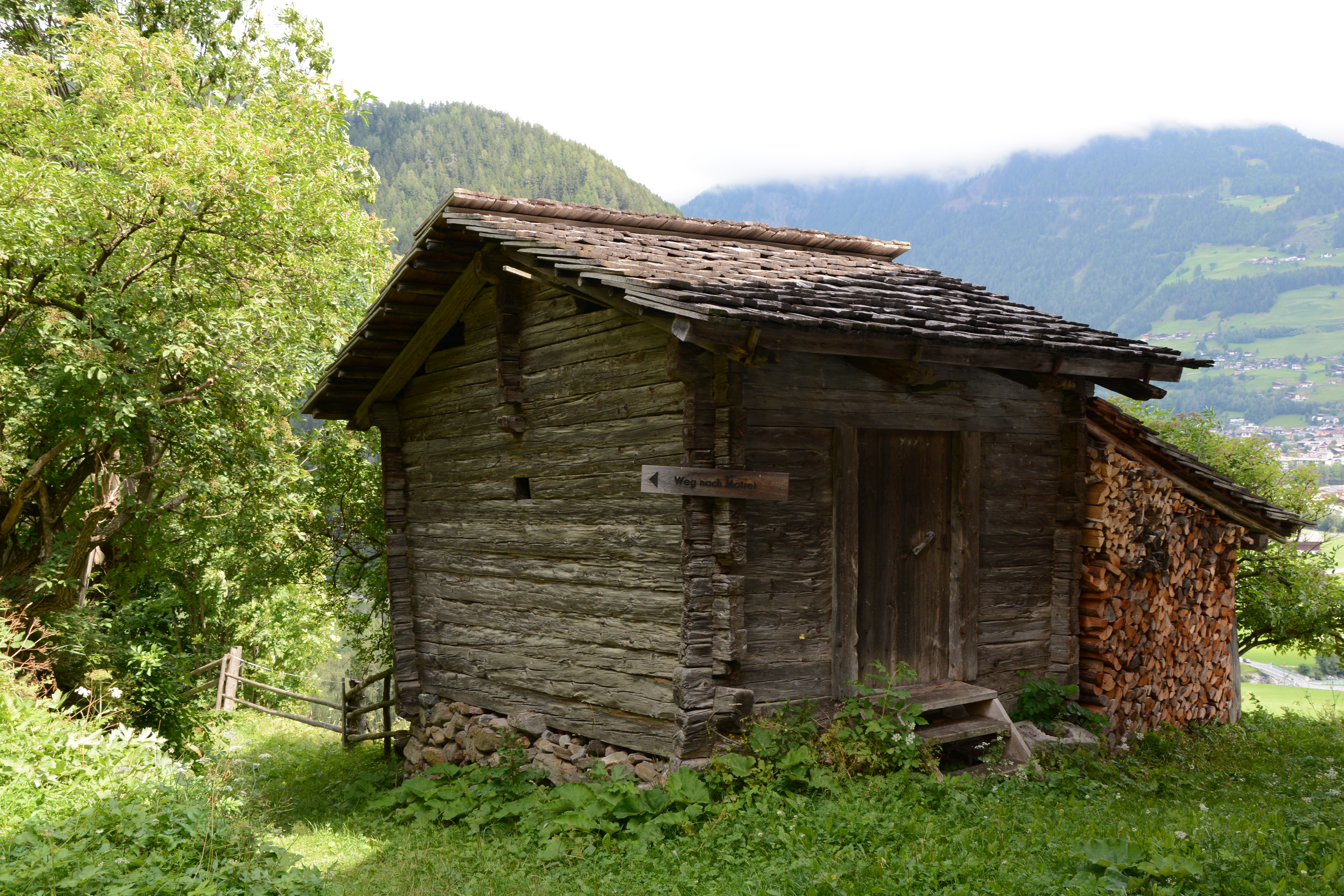 Der Kornkasten des Messnerhofs in der Fraktion Ganz , Gemeinde Matrei in Osttirol. This media shows the remarkable cultural object in the Austrian state of Tyrol listed by the Tyrolean Art Cadastre with the ID 17110. (on tirisMaps, pdf, more images on Commons, Wikidata)